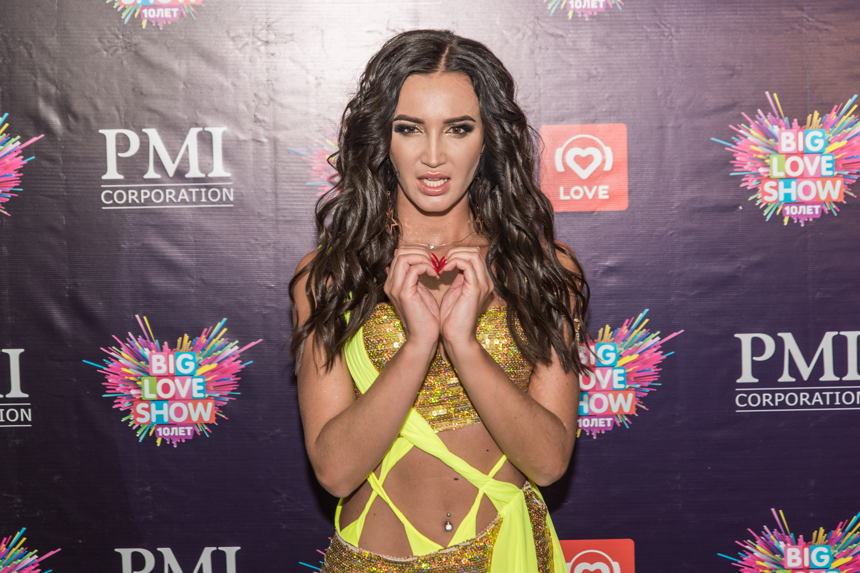 Ольга Бузова на прессволе на Big Love Show 2018 в СПб